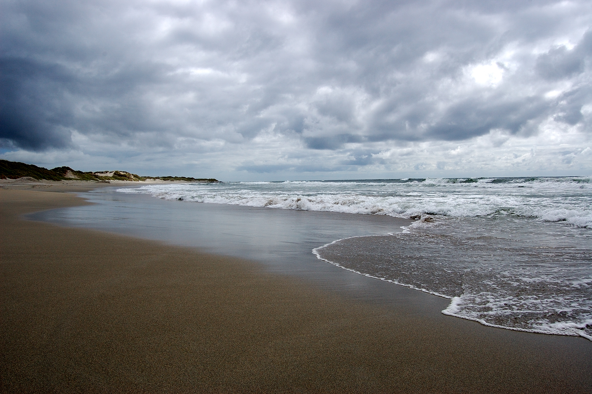 Orrestranda